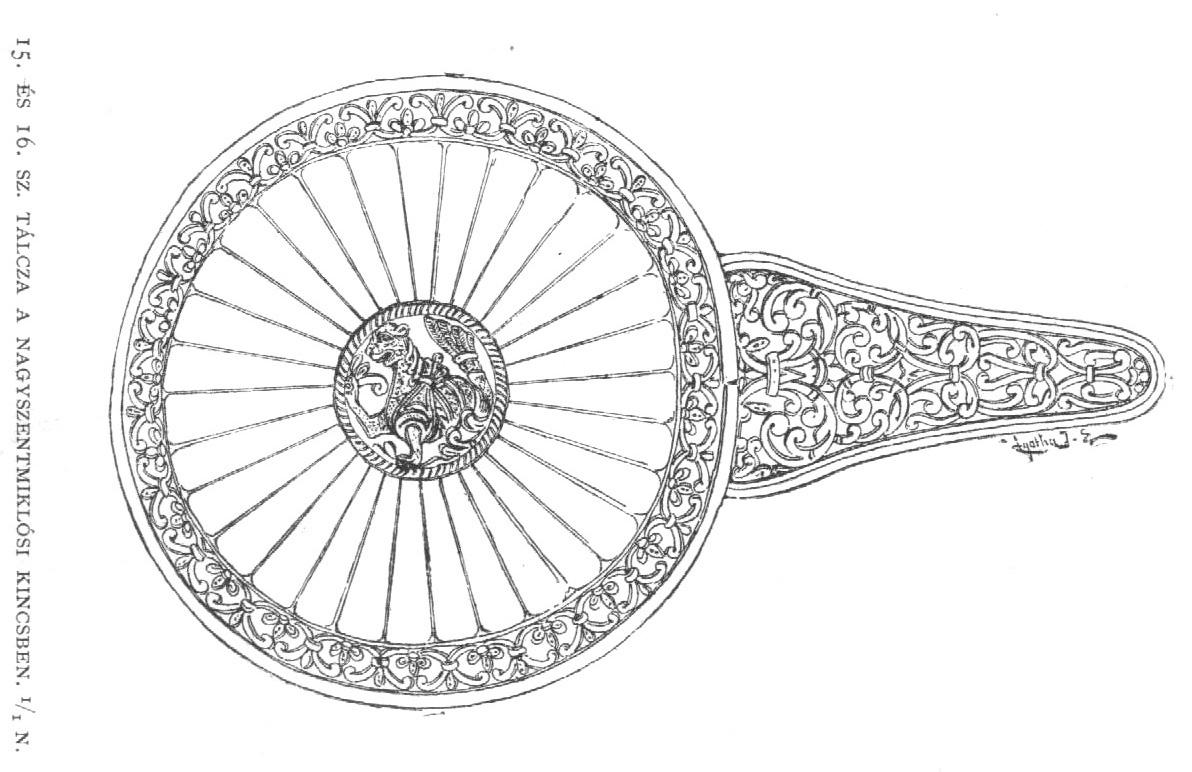 15. és 16. számú nyeles tálkák a nagyszentmiklósi kincsből